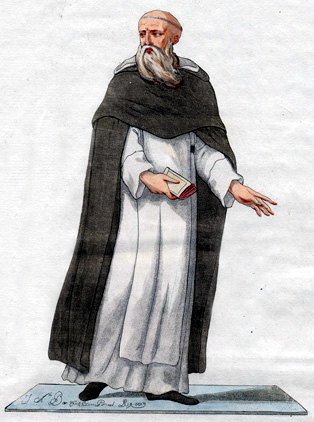 Armenian monk.